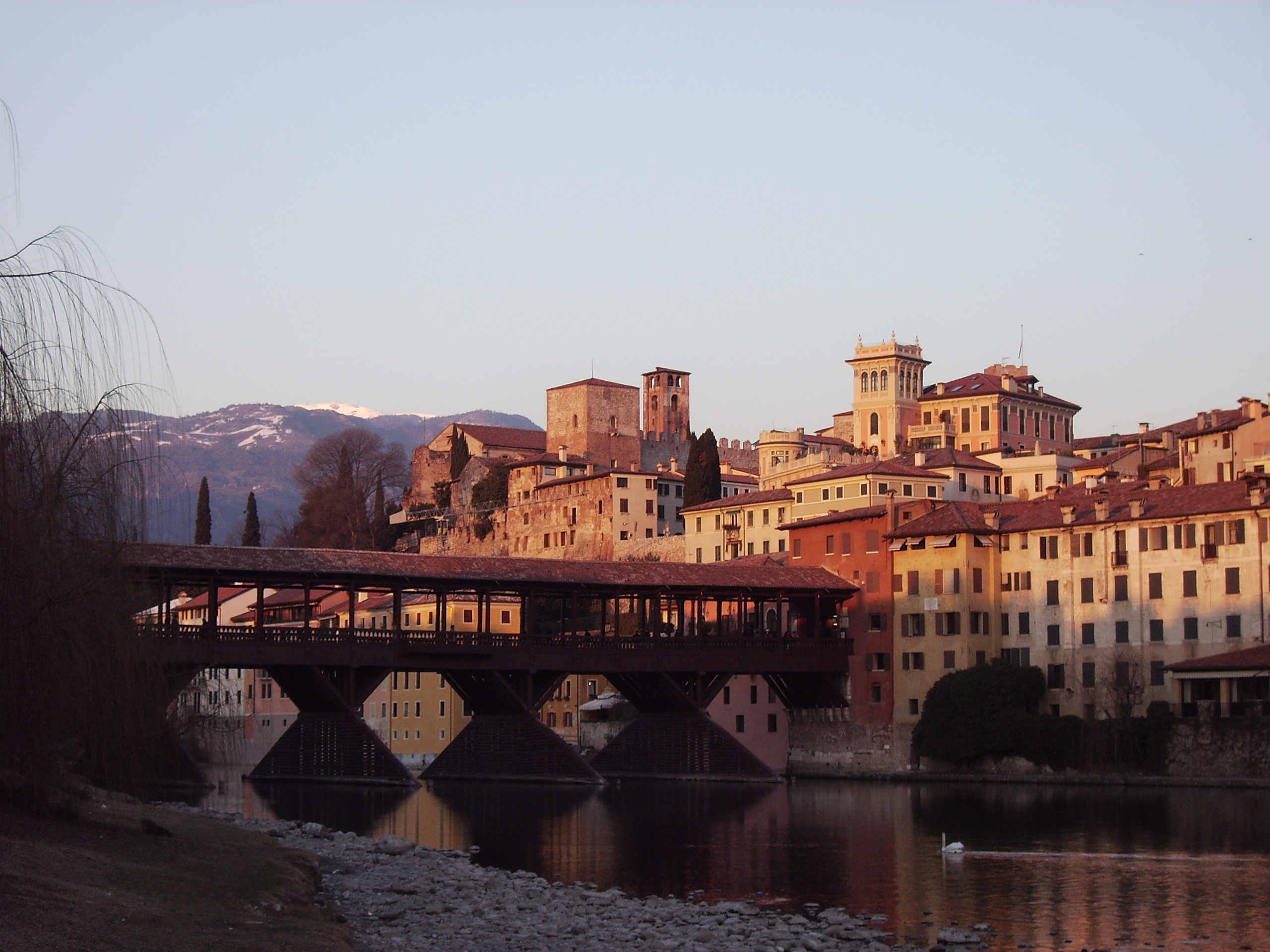 Bassano del Grappa (Vicenza, Italy)